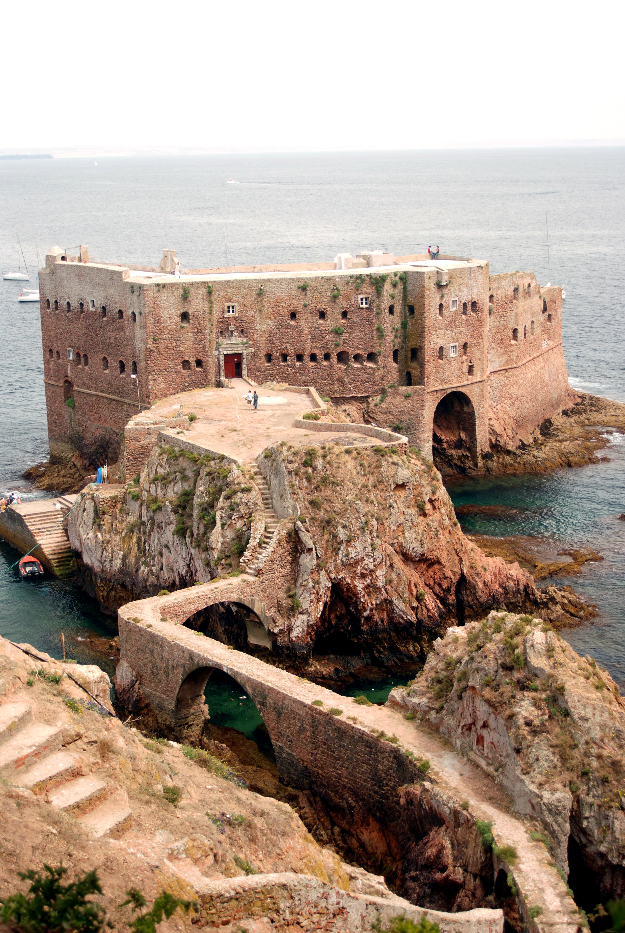 Fort on Berlenga Grande, Berlengas, Portugal.